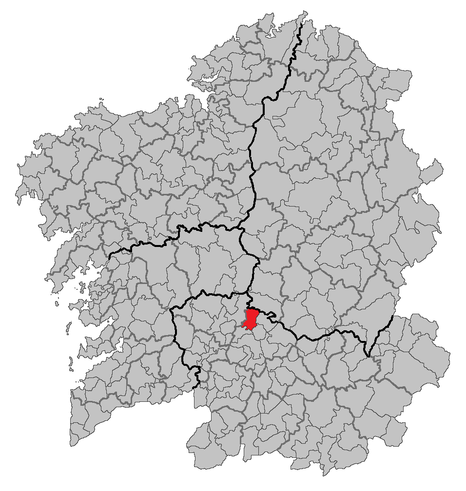 Mapa coa localización do concello de Vilamarín.